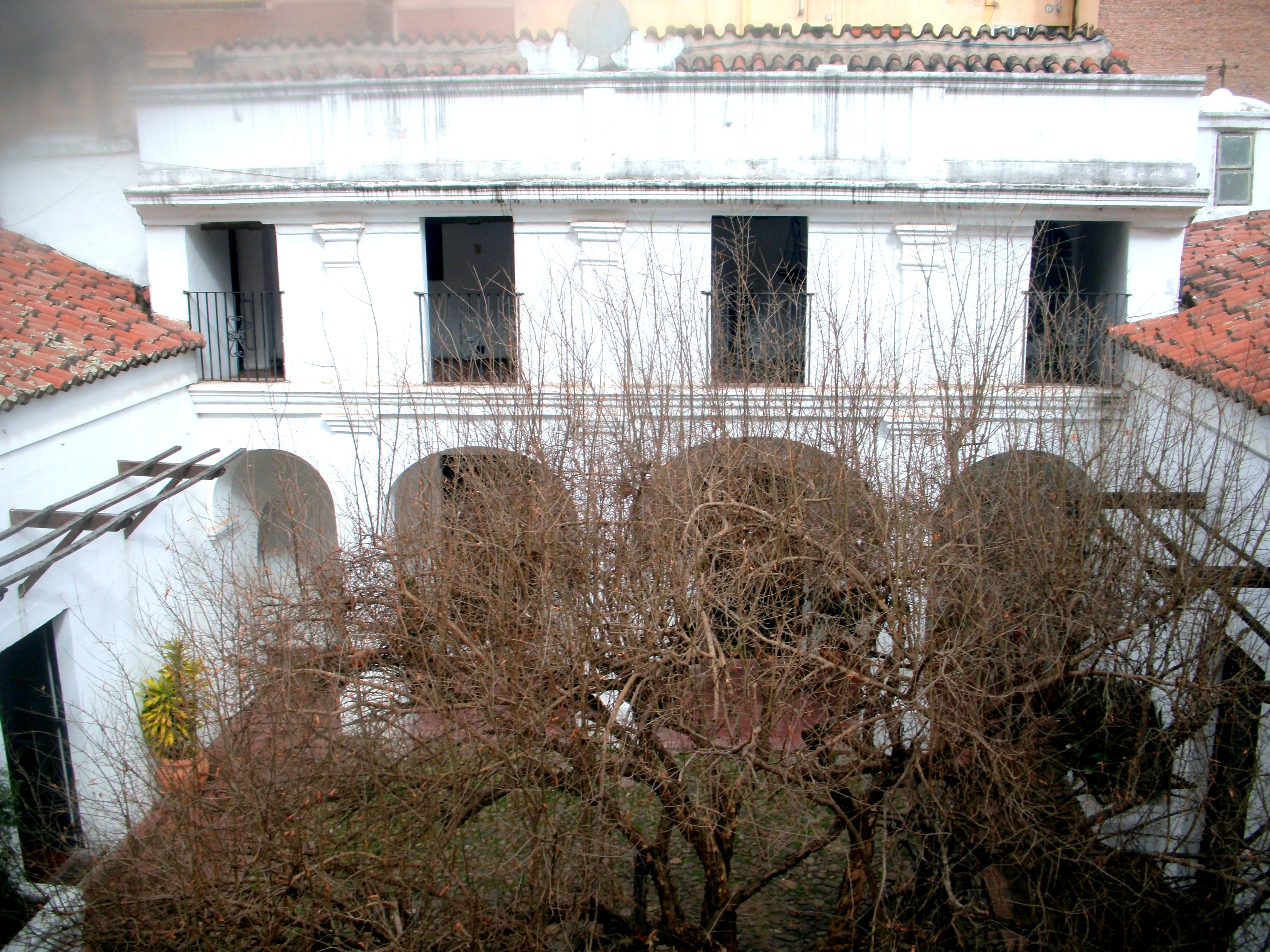 Patio interno de la casa del marques